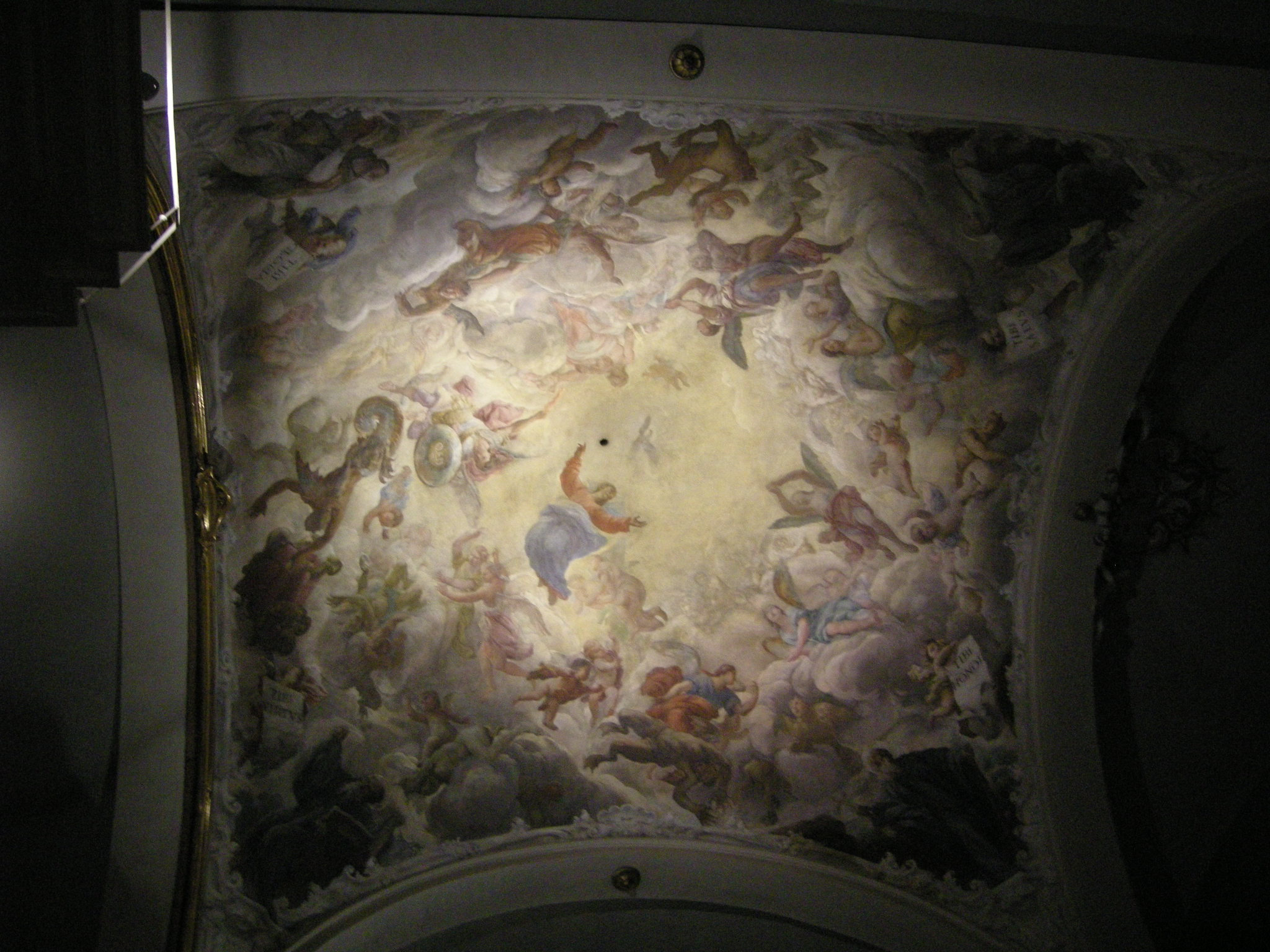 San michelino visdomini, volta